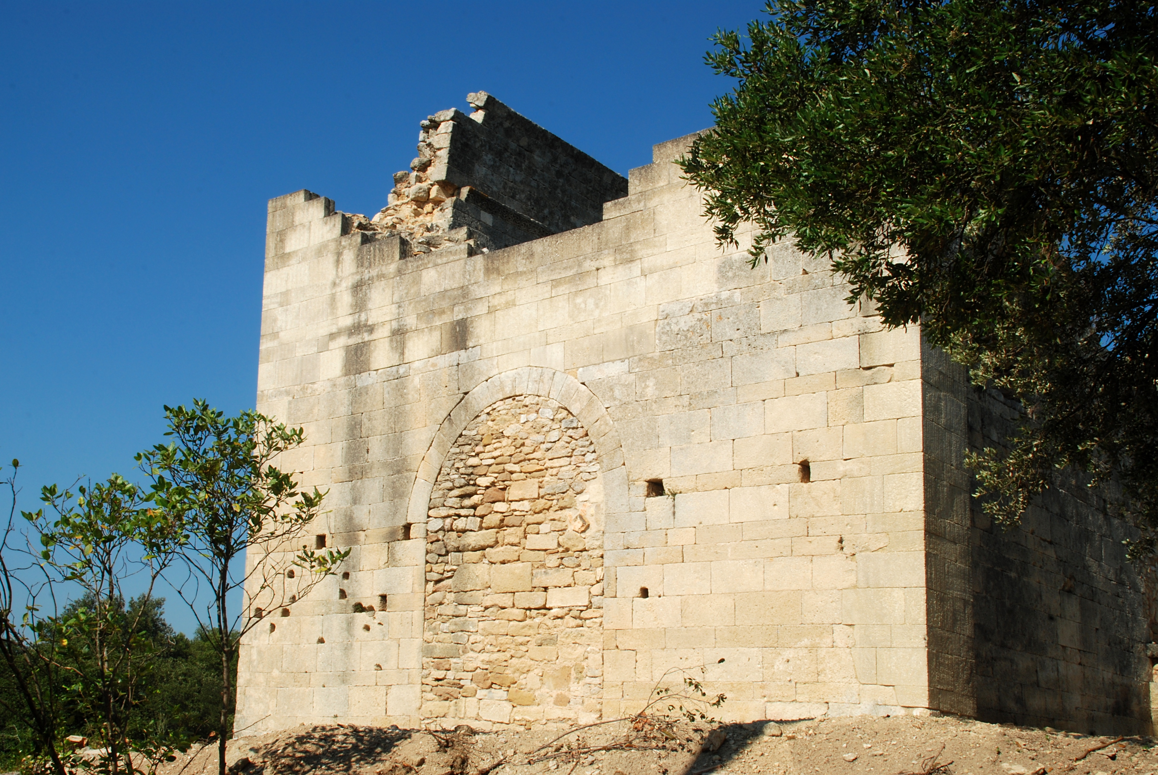 France - Gard - Église Saint-André de Souvignargues